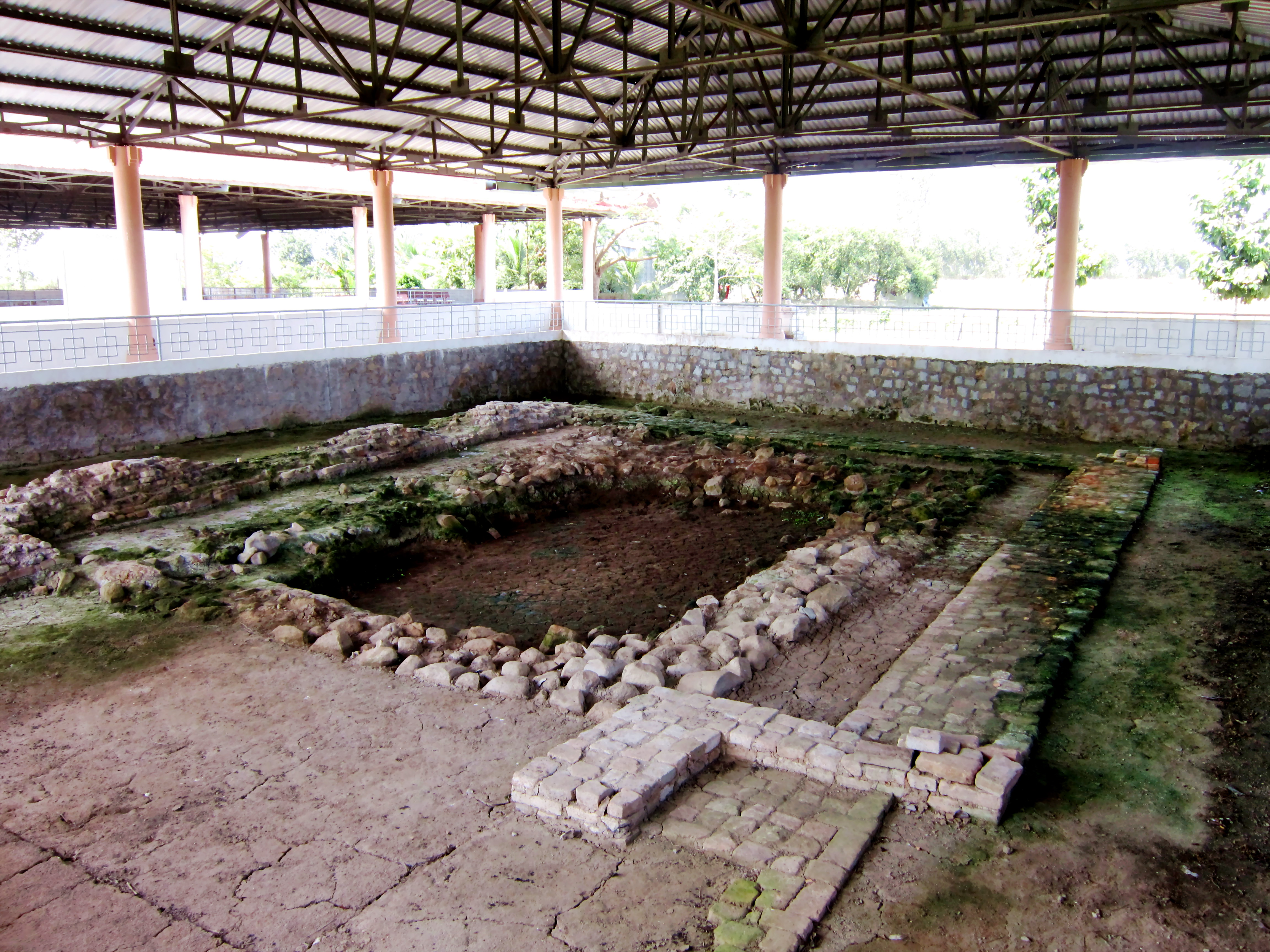 Di tích Gò Cây Thị B (một trong những di chỉ thuộc nền văn hóa Óc Eo) ở thị trấn Óc Eo, huyện Thoại Sơn, An Giang, Việt Nam.